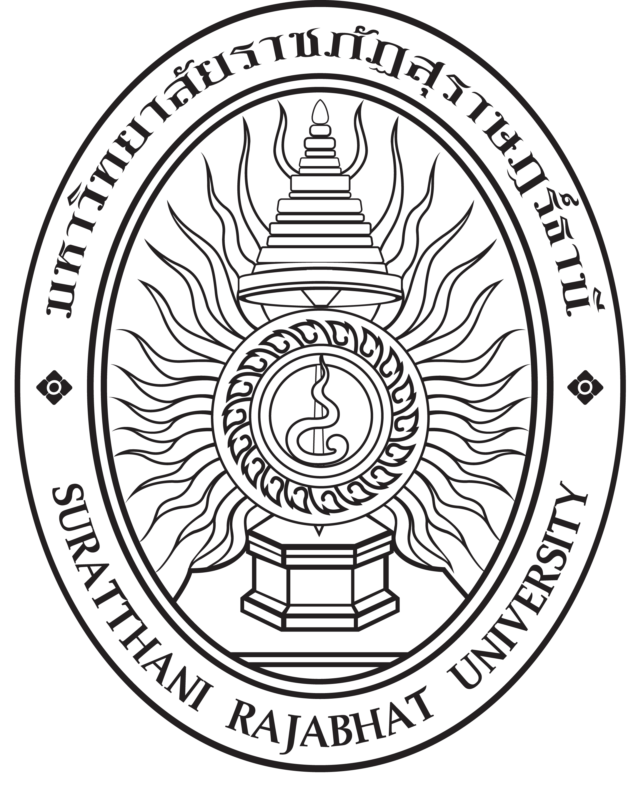 ตราสัญลักษณ์ประจำมหาวิทยาลัยราชภัฏสุราษฎร์ธานีแบบลายเส้น